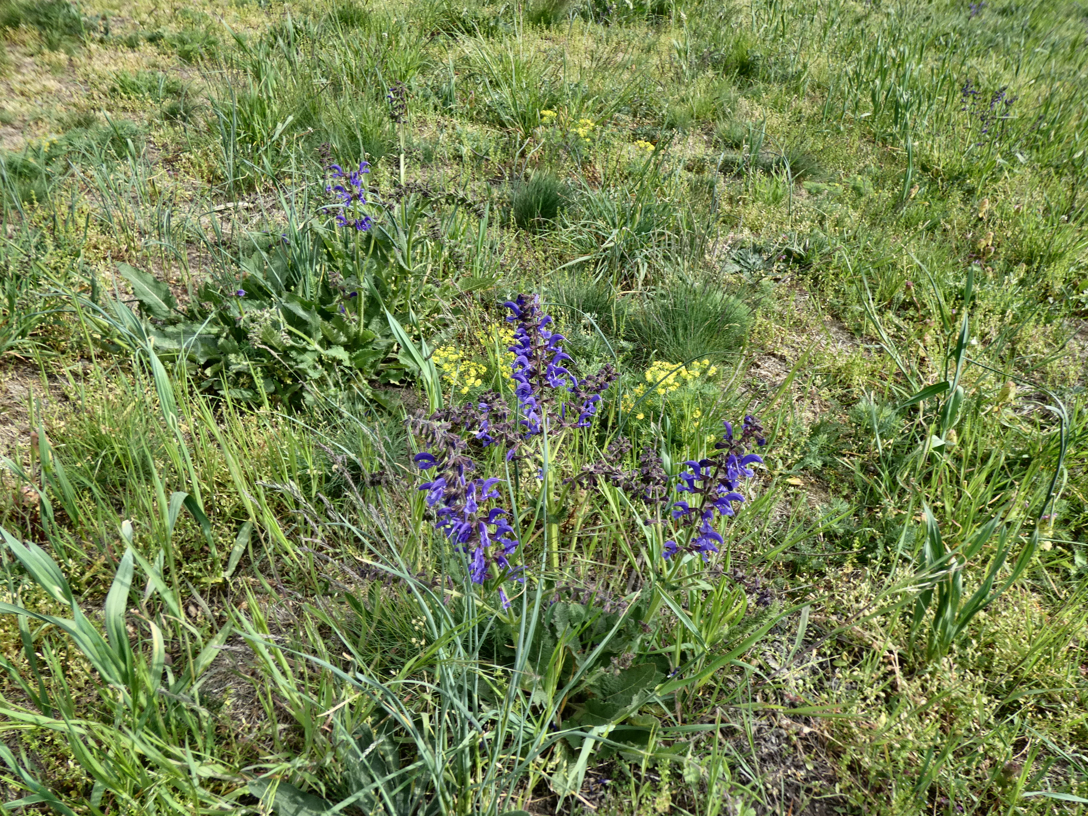 Blühende Rasenflächen auf den Klausbergen, Halle (Saale)